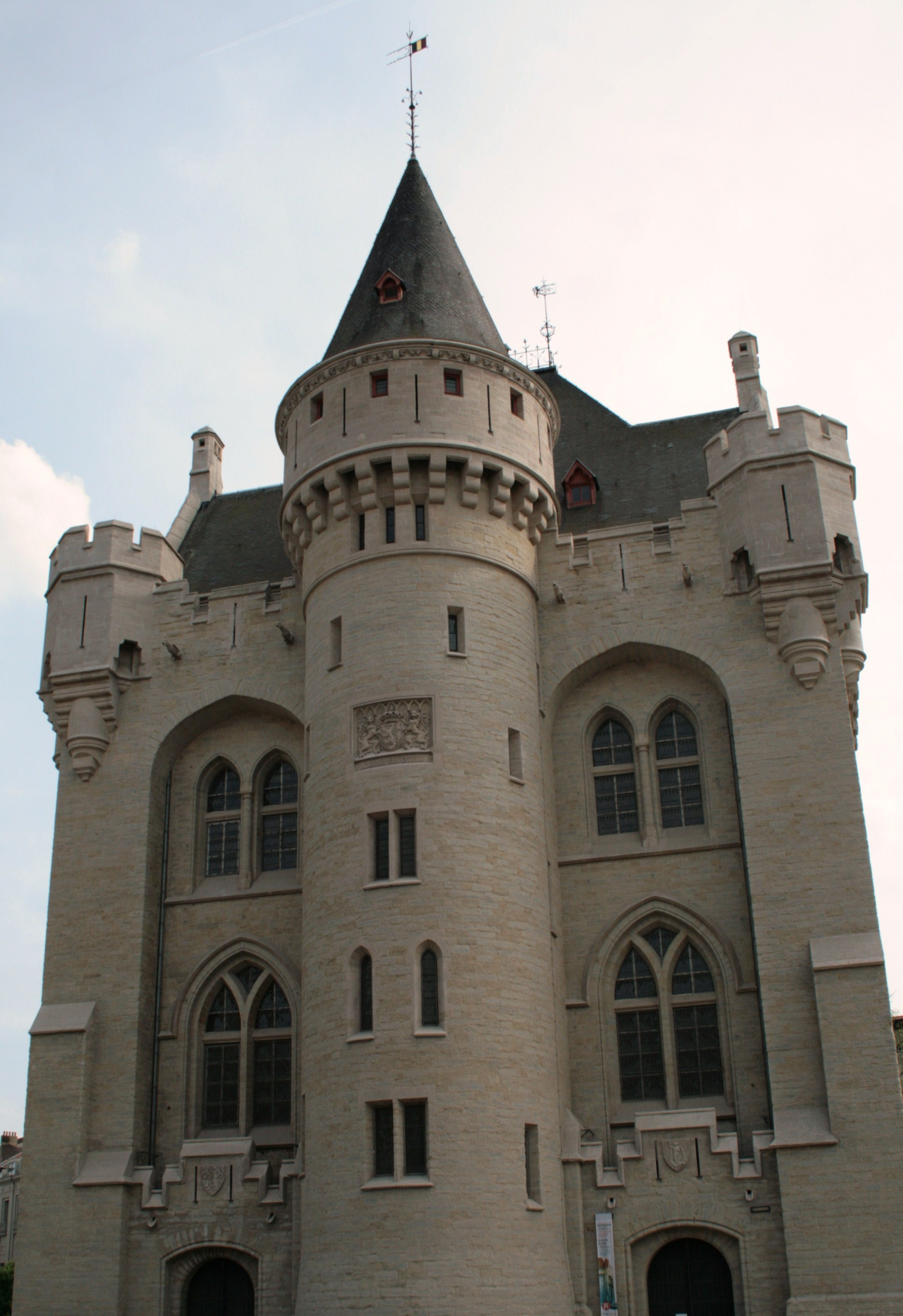 Городские ворота Халле (Брюссель)